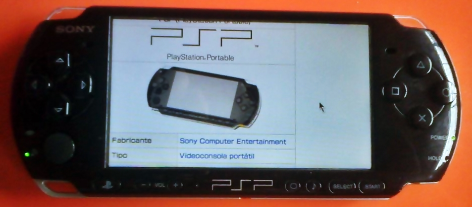 Un Playstation Portable 3000 en idioma español funcionando con su ultima versión estable